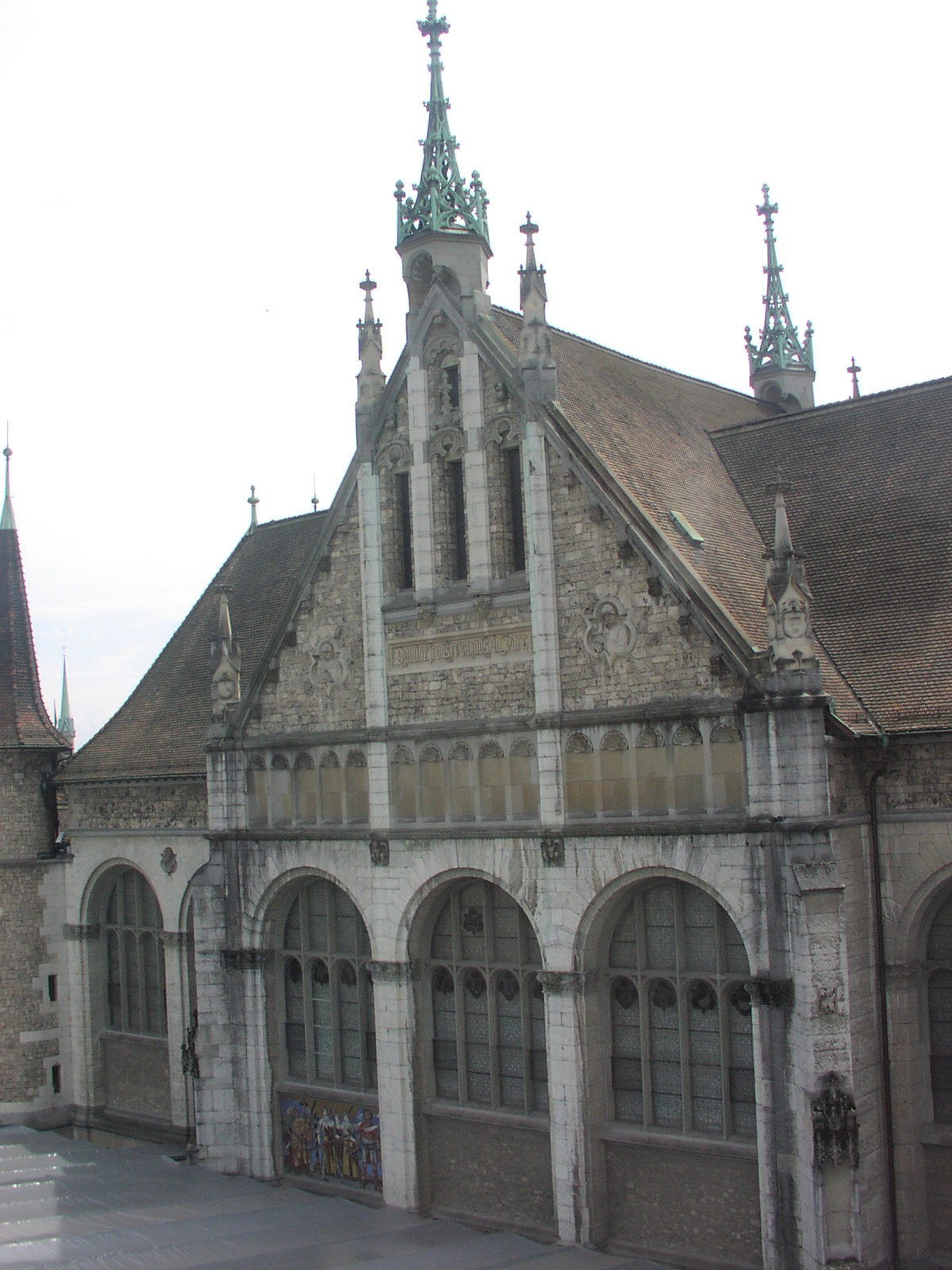 A svájci nemzeti múzeum zürichi épülete. Az egyik belső udvar.